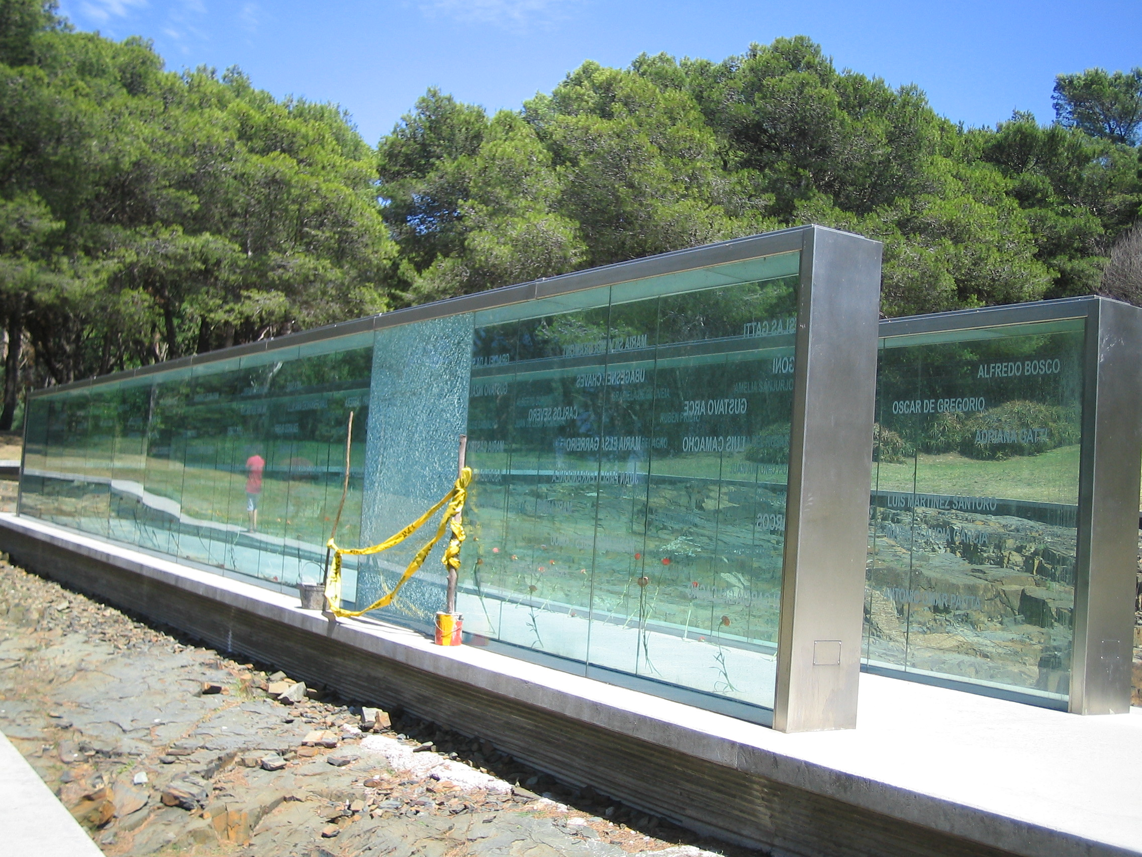 "Memorial en recordación de los detenidos desaparecidos", Parque Vaz Ferreira, Cerro, Montevideo. Autores Arq. Martha Kohen y Ruben Otero. Inaugurado el 10 de diciembre de 2001.